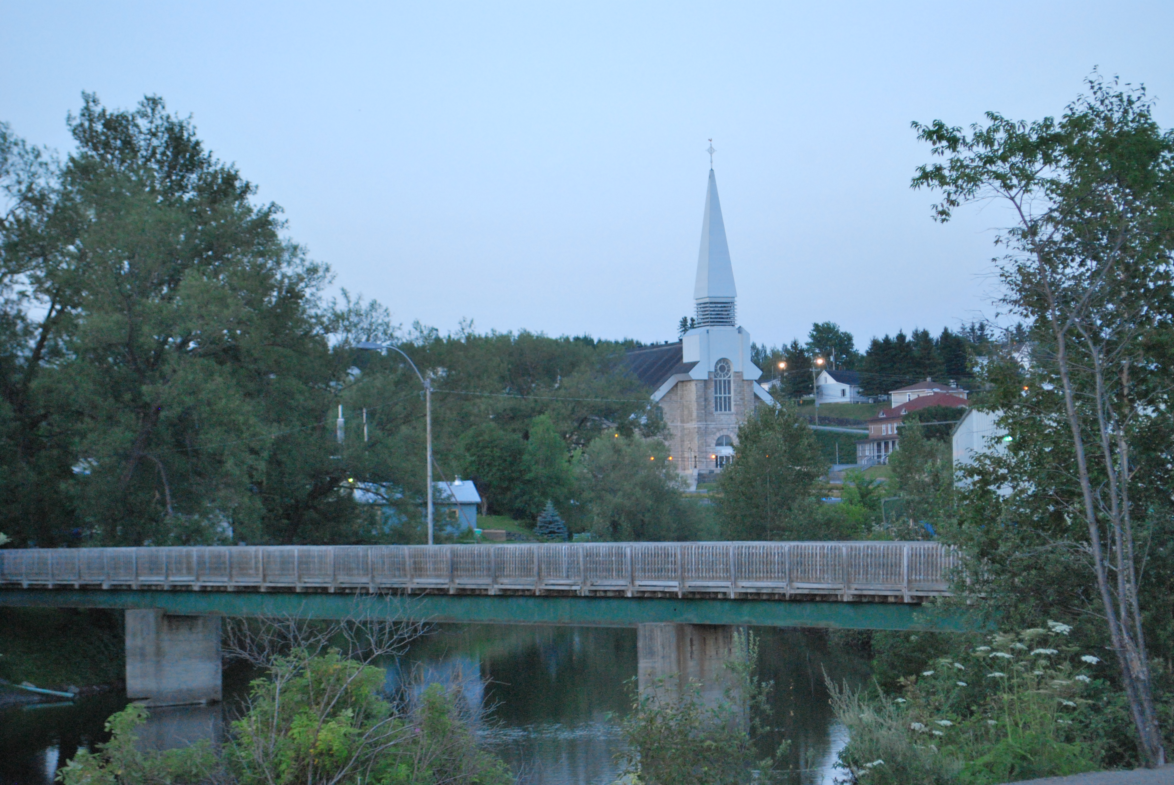 Vue d'Amqui, au Québec, à partir de l'arrière du restaurant « La Gourmandise ».